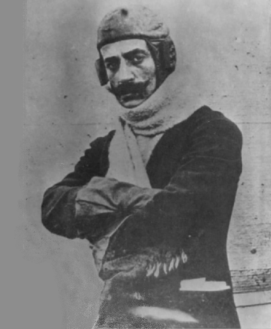 Greek pioneer aviator Dimitrios Kamberos